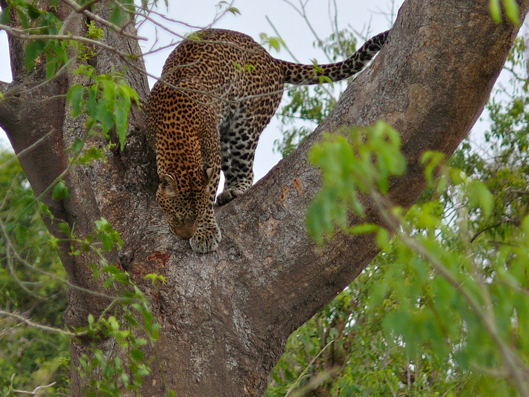 Murchison Falls NP, UGANDA